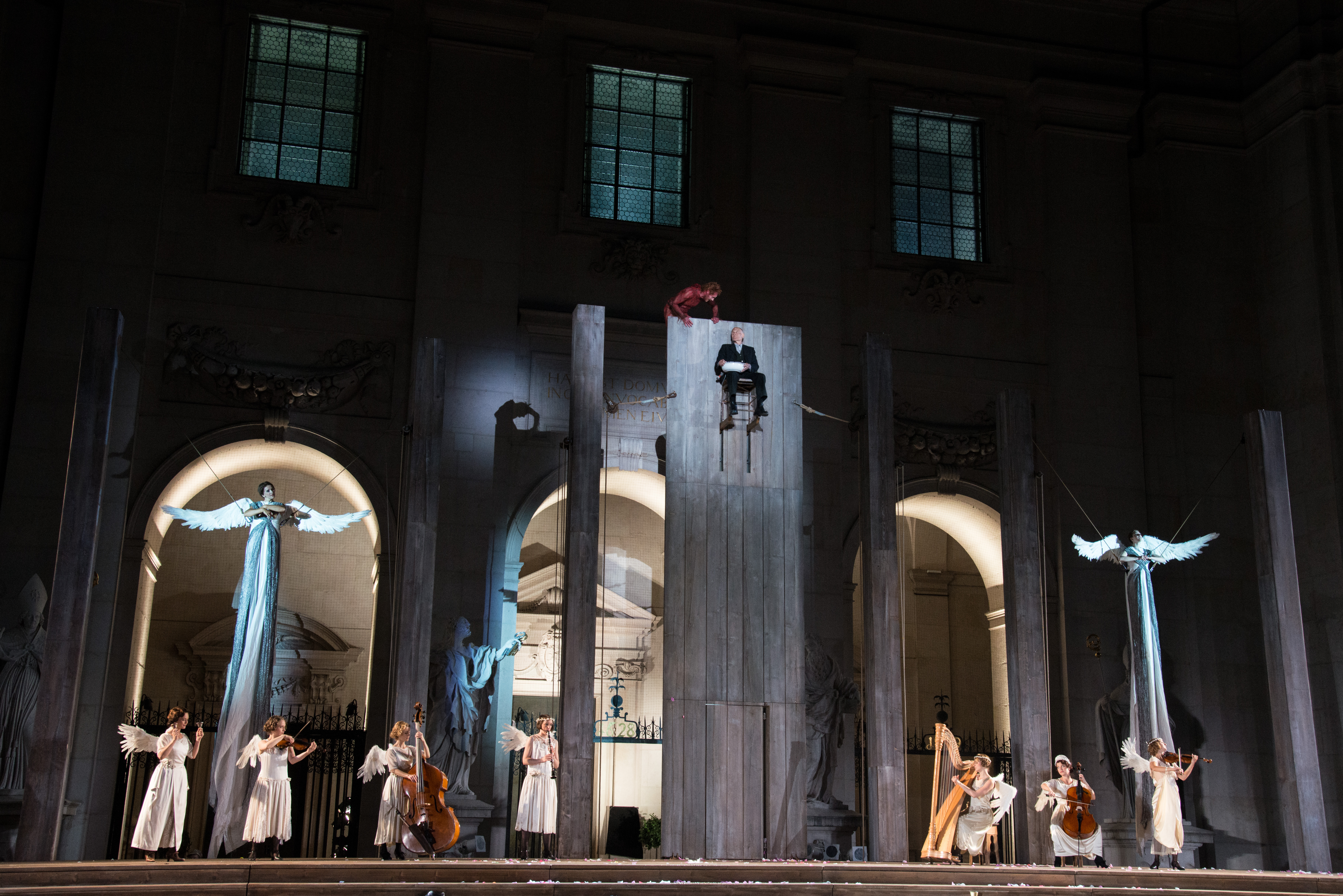 Jedermann, Salzburger Festspiele 2014, Besprechung zwischen Teufel und Glauben. Mit Simon Schwarz (links) und Hans Peter Hallwachs (rechts). Regie: Julian Crouch und Brian Mertes